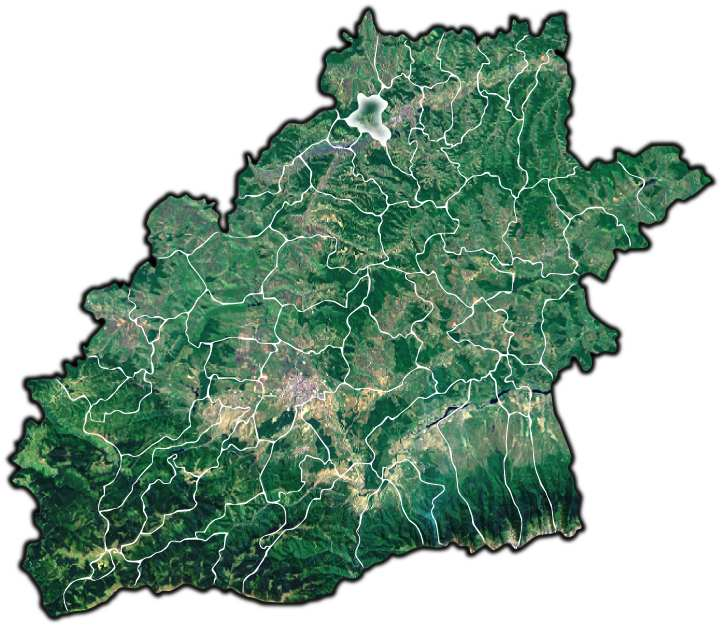 Tarnava jud Sibiu